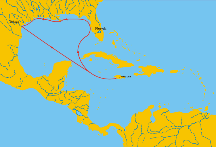 Alonso de Pineda - mapa ekspedycji. Autor: Paweł Wajda (2004).